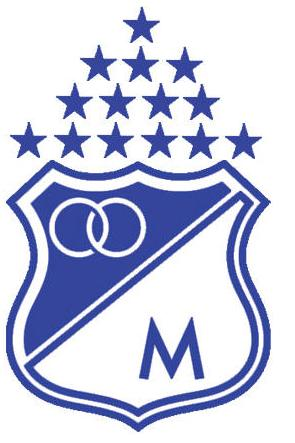 escudo de millonarios con 14 estrellas